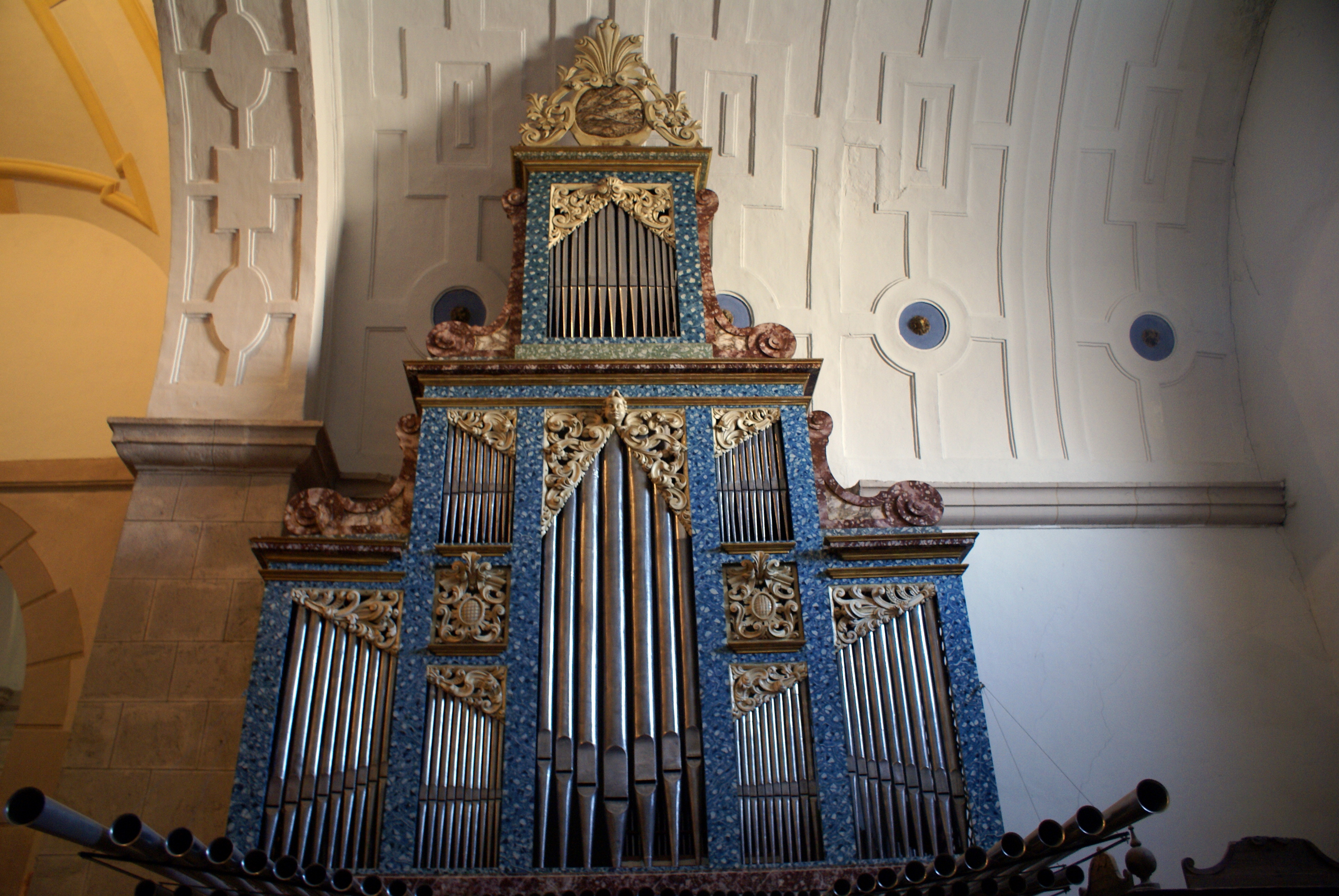 Órgano de la iglesia de Santa María Magdalena de Matapozuelos, Valladolid, España.